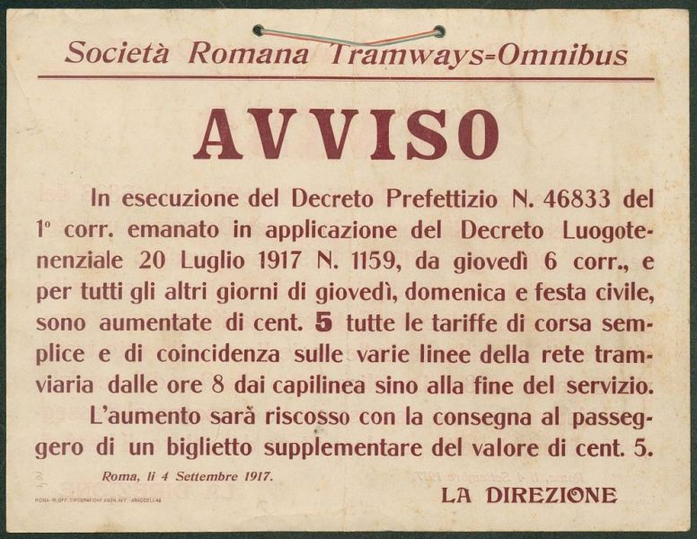 Avviso srto